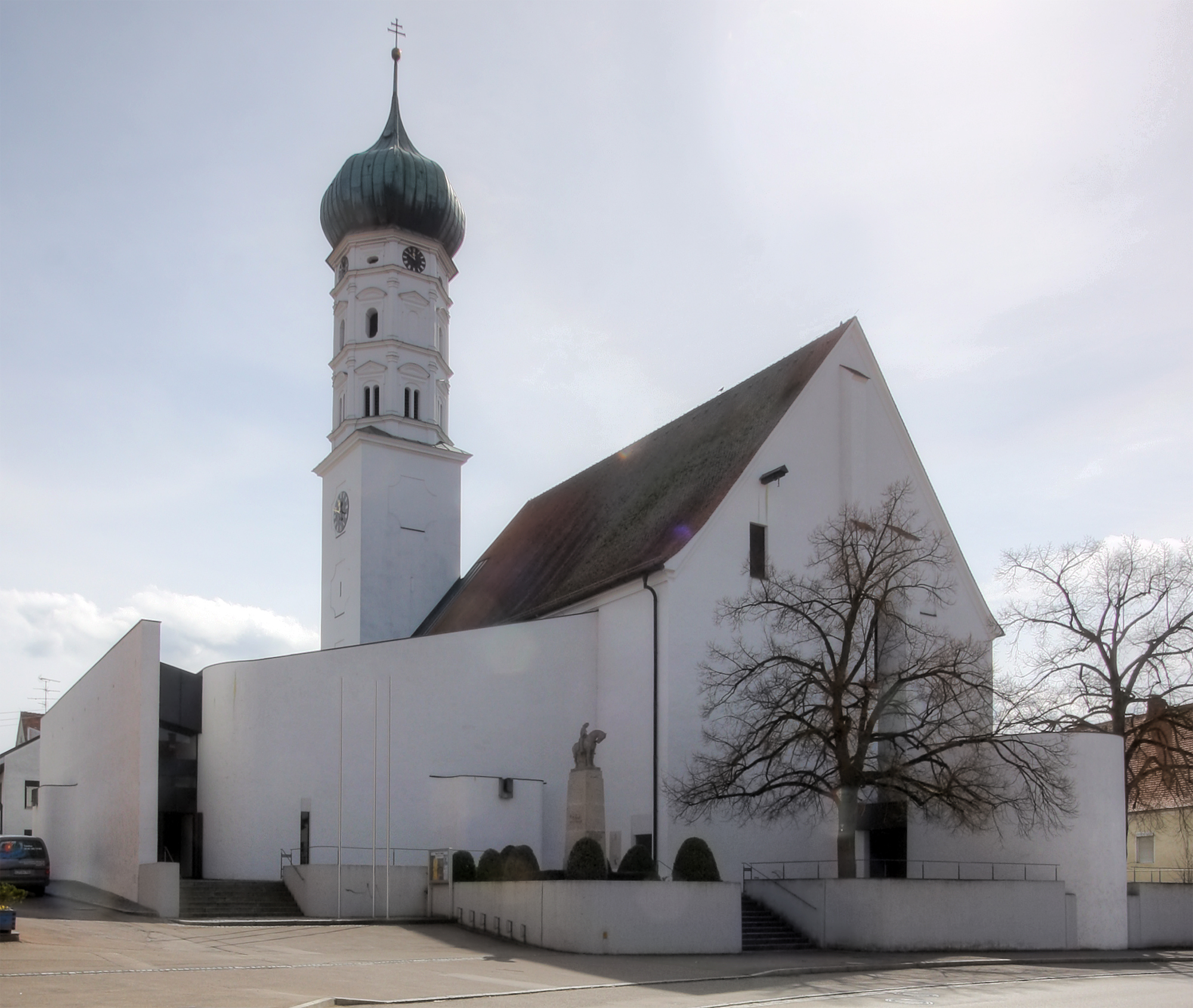 Jettingen-Scheppach, Kirche St. Martin, Architekt Erweiterungsbau: Alexander von Branca